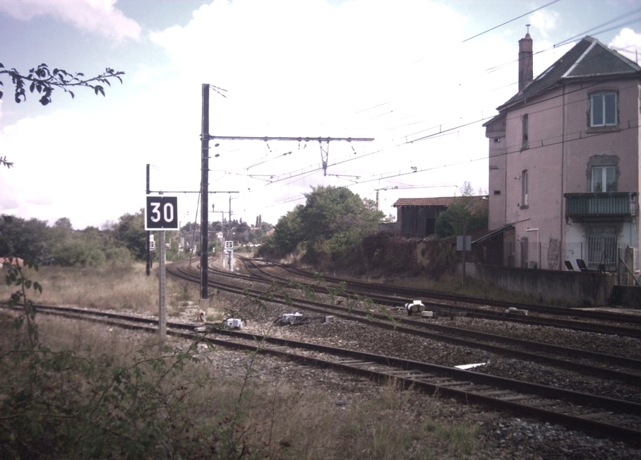 La jonction de Sathonay : Trévoux - LGV-SE - Bourg